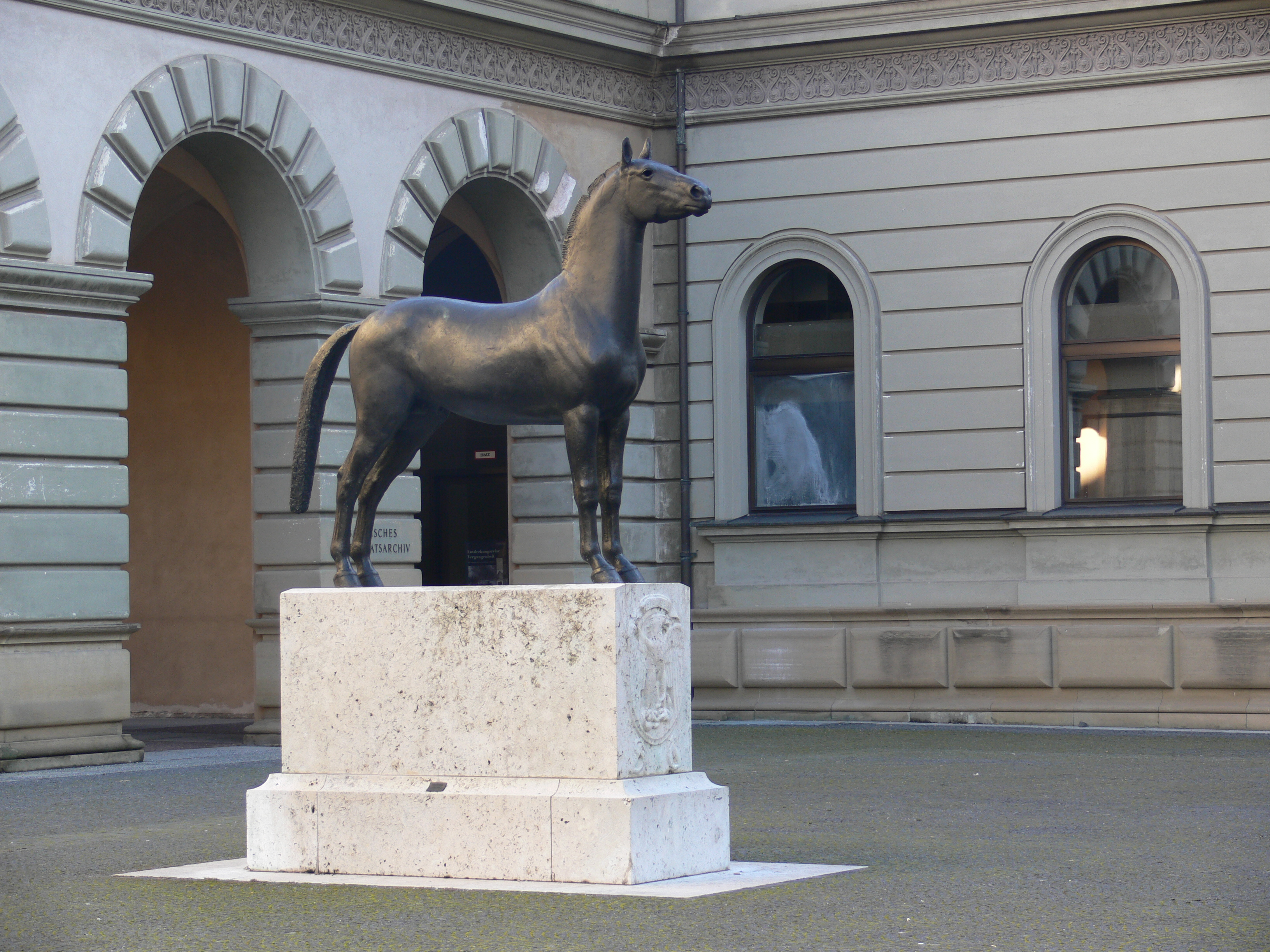 München, Ehrenhof des Staatsarchivs München und des Bayerischen Hauptstaatsarchivs, Schönfeldstraße 3/5; "Pferdestandbild für die deutsche Kavallerie 1870–1945", 1960 von Bernhard Bleeker